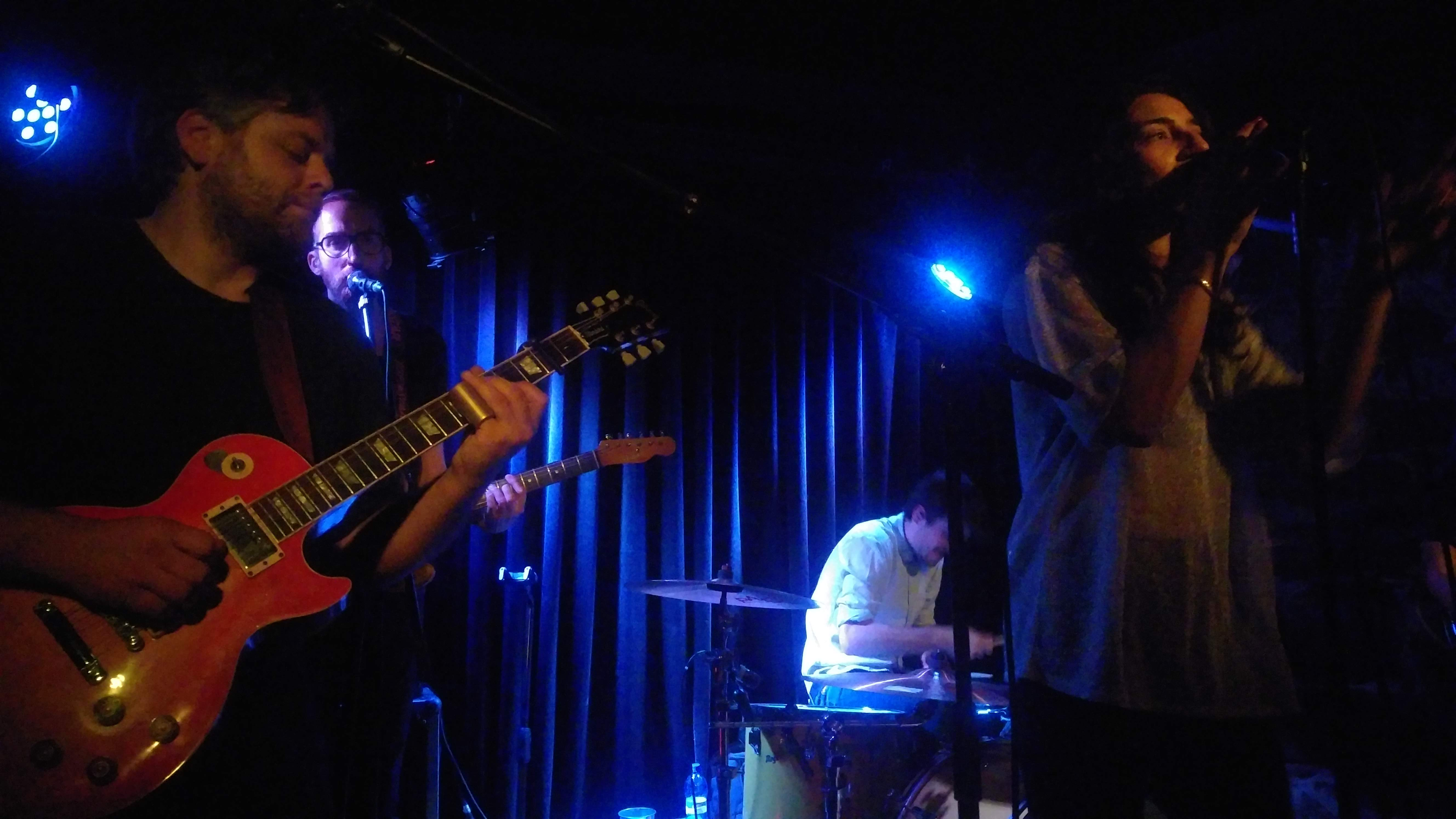 Intergalactic Lovers Lausanne 2018